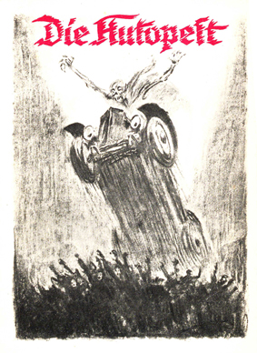 Die Autopest. Verlag Theodor Weicher, Leipzig 1926, Umschlagillustration, Künstler unbekannt